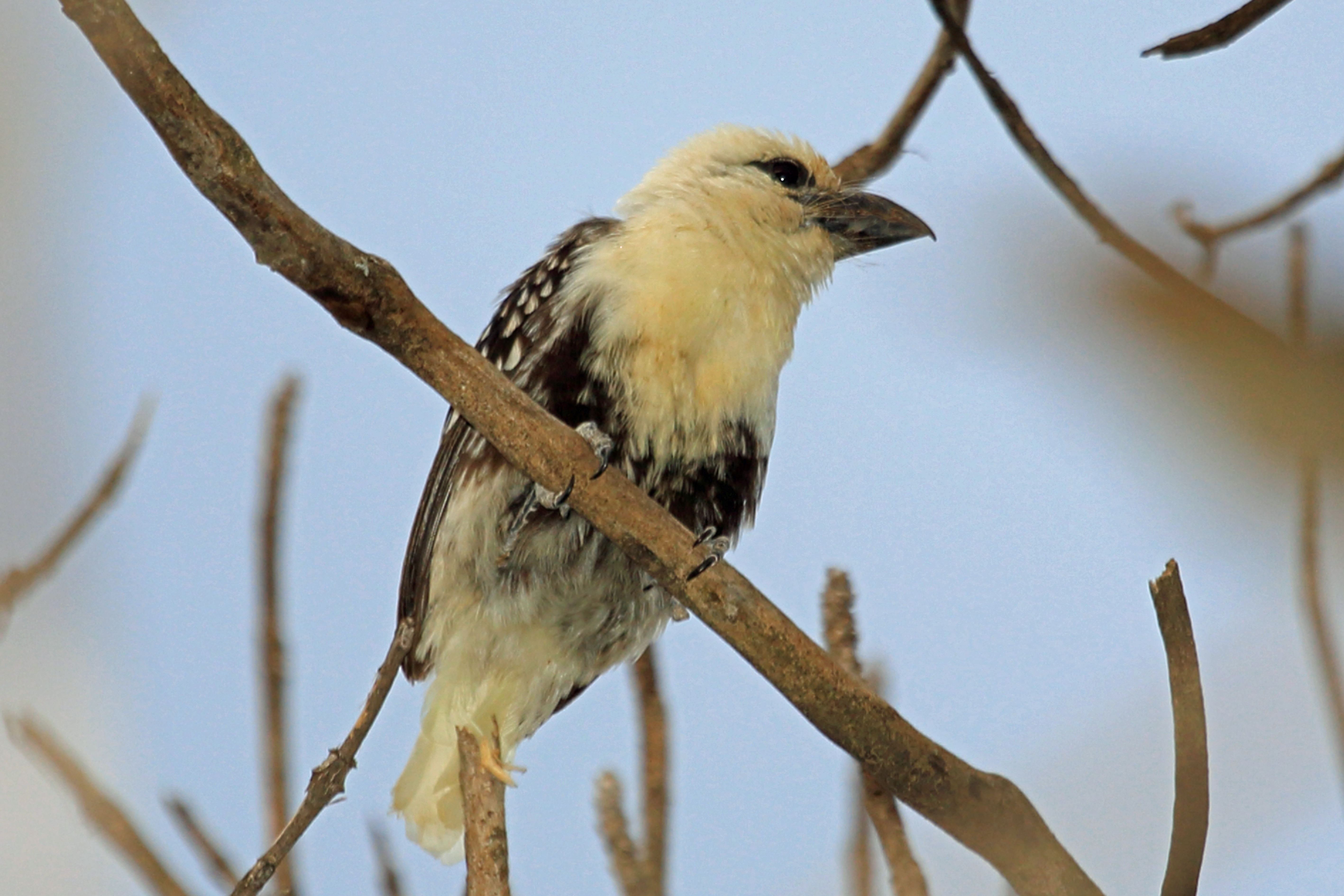 White-headed Barbet, Lake Manyara, Tanzania